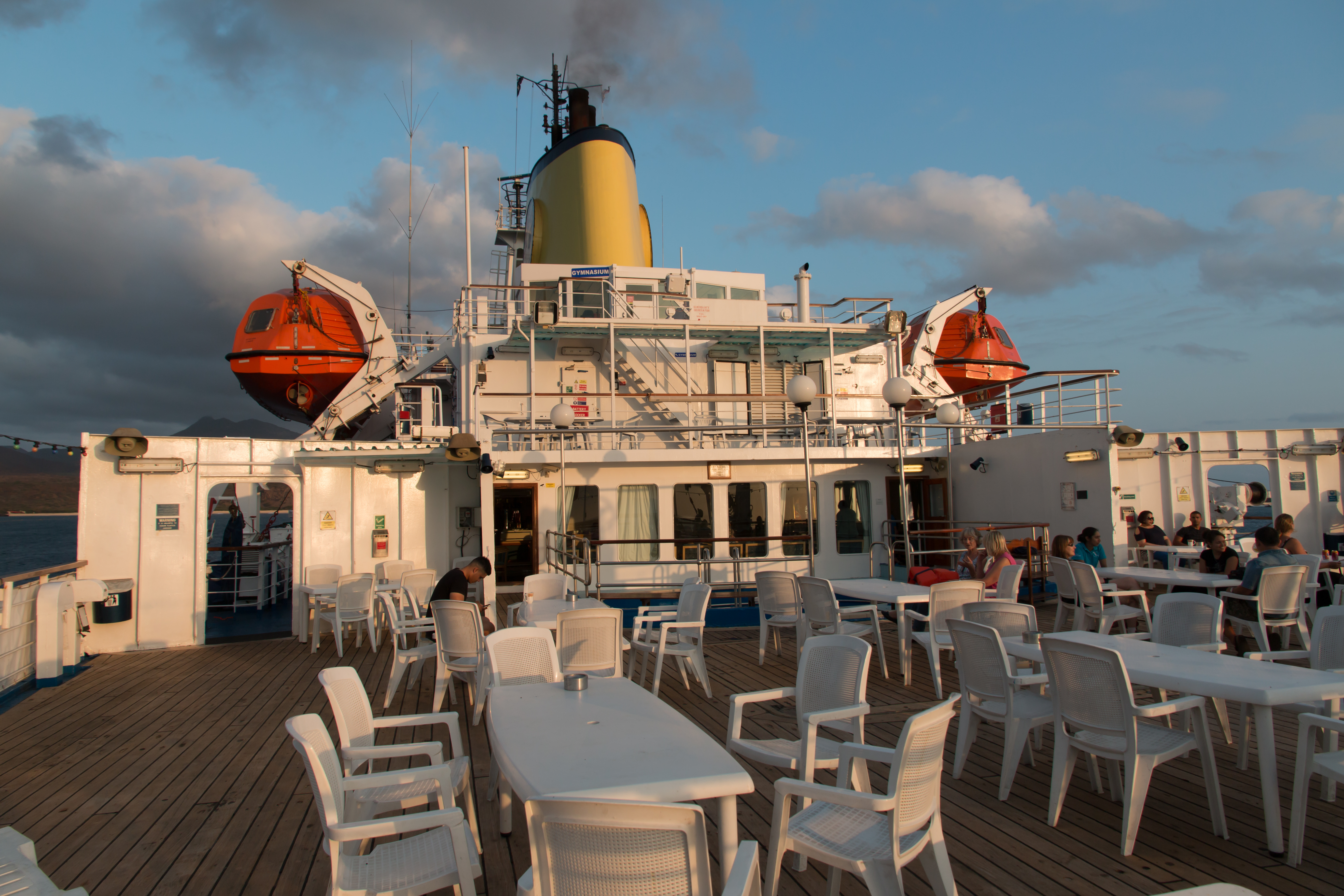 RMS St Helena